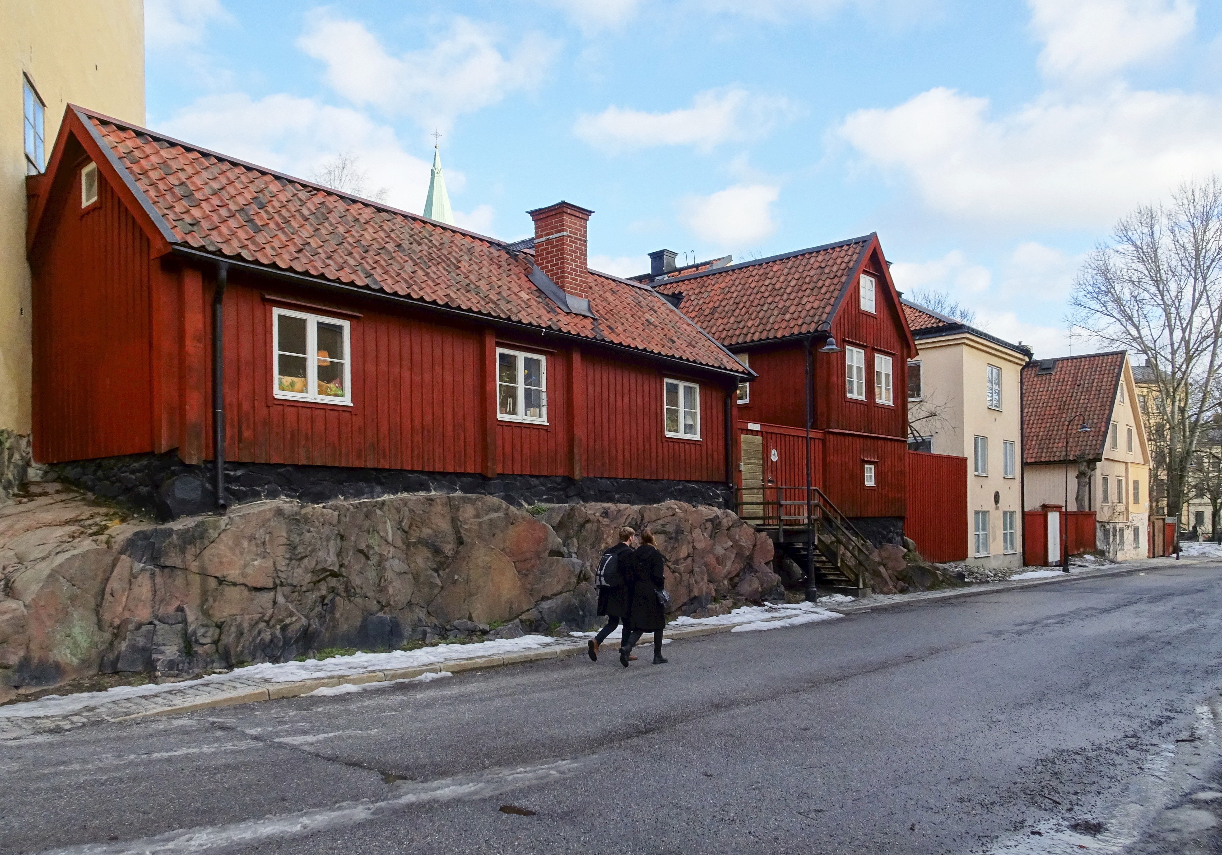 Nytorget 9 (närmast), 11 och 13, fastigheten Bondesonen större 21, 22 och 23